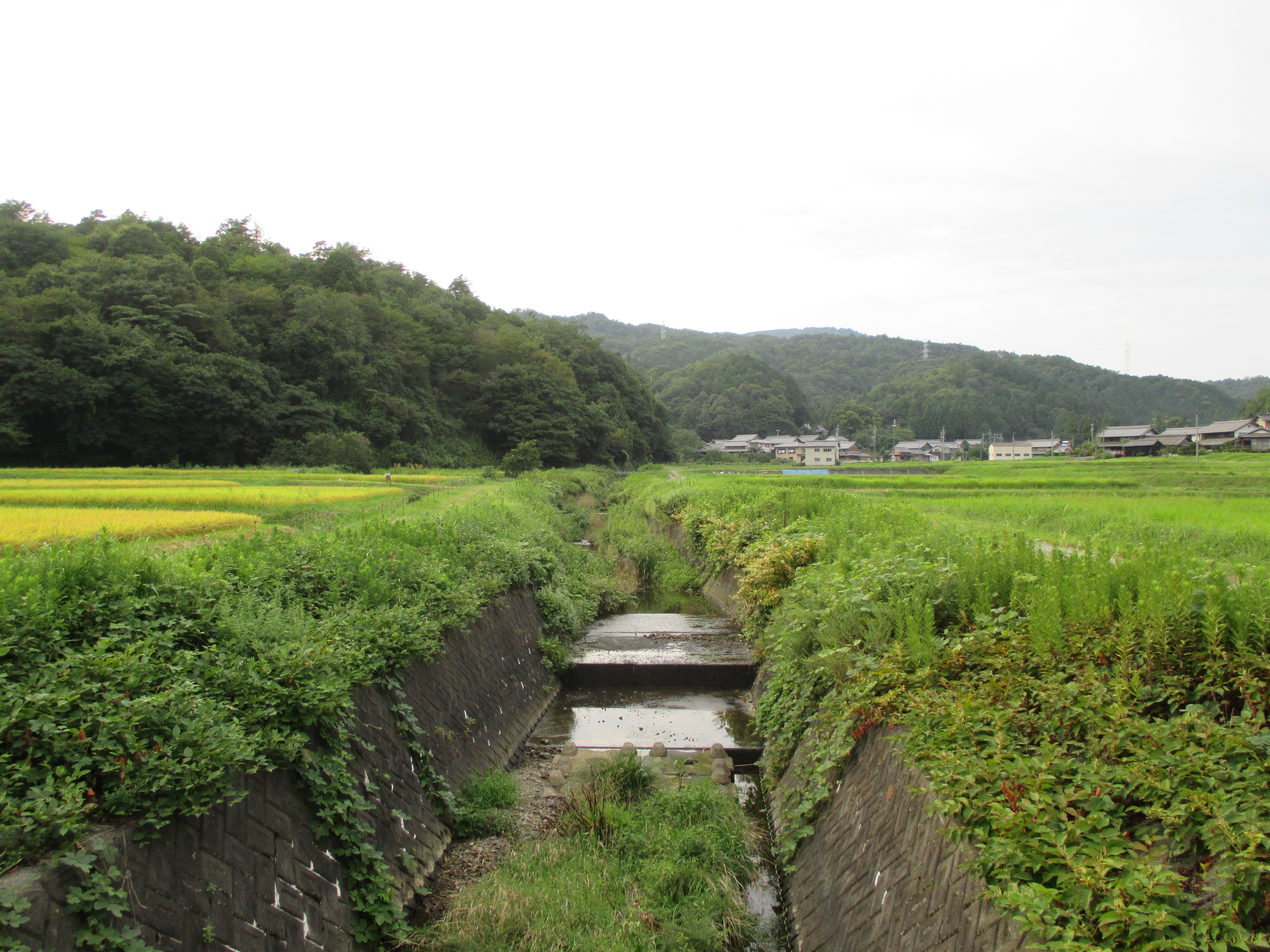 内海街道橋より北側を撮影